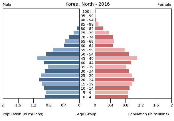 A population pyramid illustrates the age and sex structure of a country's population and may provide insights about political and social stability, as well as economic development. The population is distributed along the horizontal axis, with males shown on the left and females on the right. The male and female populations are broken down into 5-year age groups represented as horizontal bars along the vertical axis, with the youngest age groups at the bottom and the oldest at the top. The shape of the population pyramid gradually evolves over time based on fertility, mortality, and international migration trends.